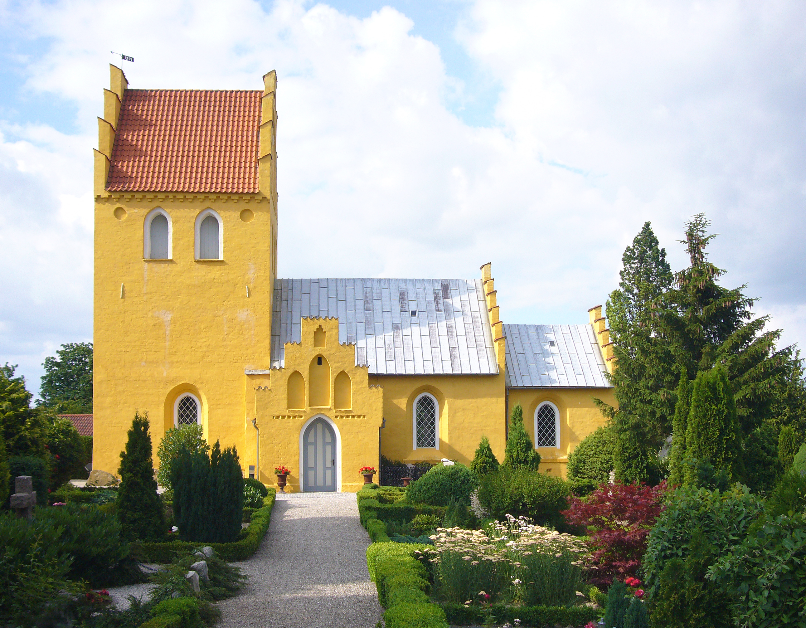 Havdrup Kirke, Gammel Havdrup, Denmark.